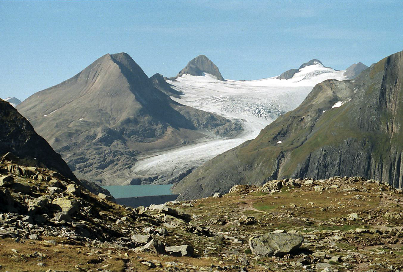 Blick auf den Griesgletscher und den Griessee